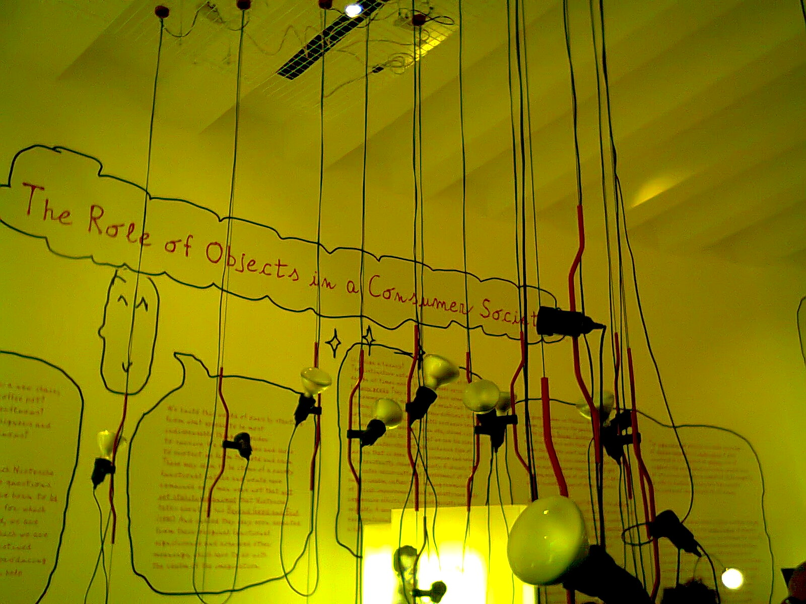 Fotografia fatta durante un giorno straordinario di apertura gratuita con libertà di foto presso il Triennale Design Museum di Milano. L'evento 2011 (quarta edizione) intitolato: LE FABBRICHE DEI SOGNI è dedicato agli uomini, le idee, le imprese e i paradossi delle fabbriche del design italiano.